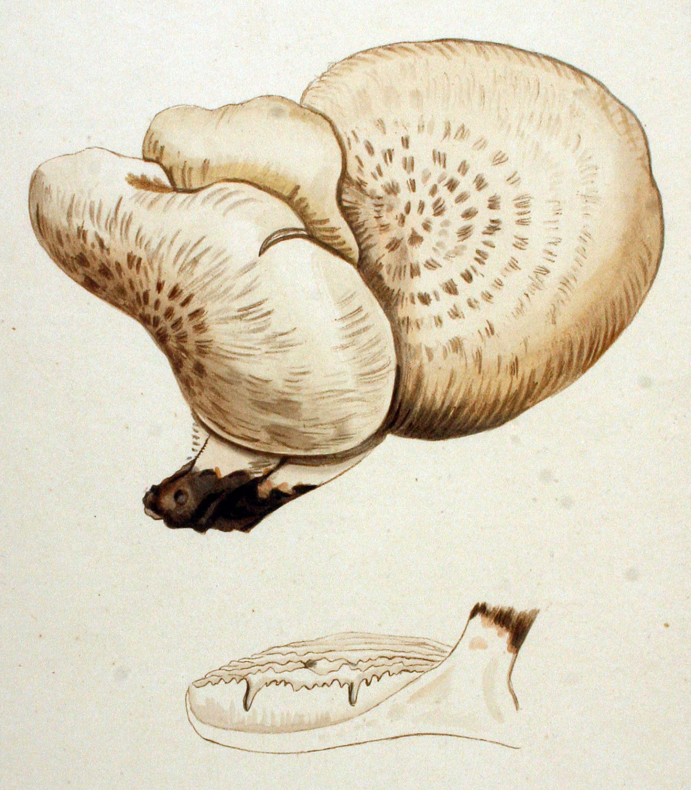 Lentinus lepideus (Fries) Fries 1825